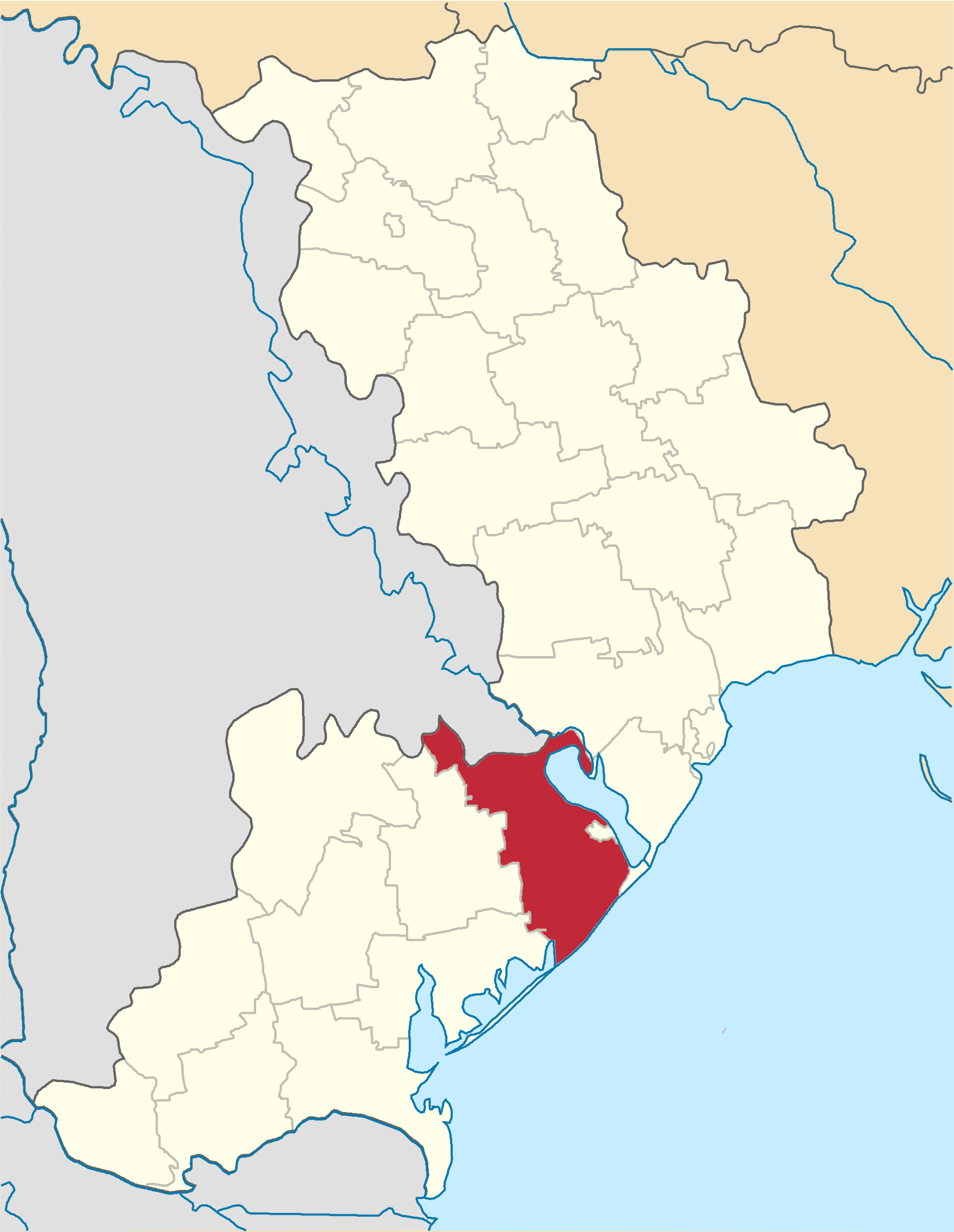 BilgorodDnistrovskyi-Raion map